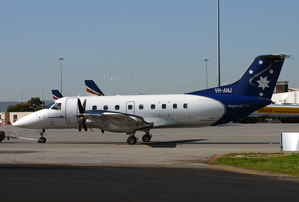 VH-ANJ Embraer EMB-120 Regional at Adelaide